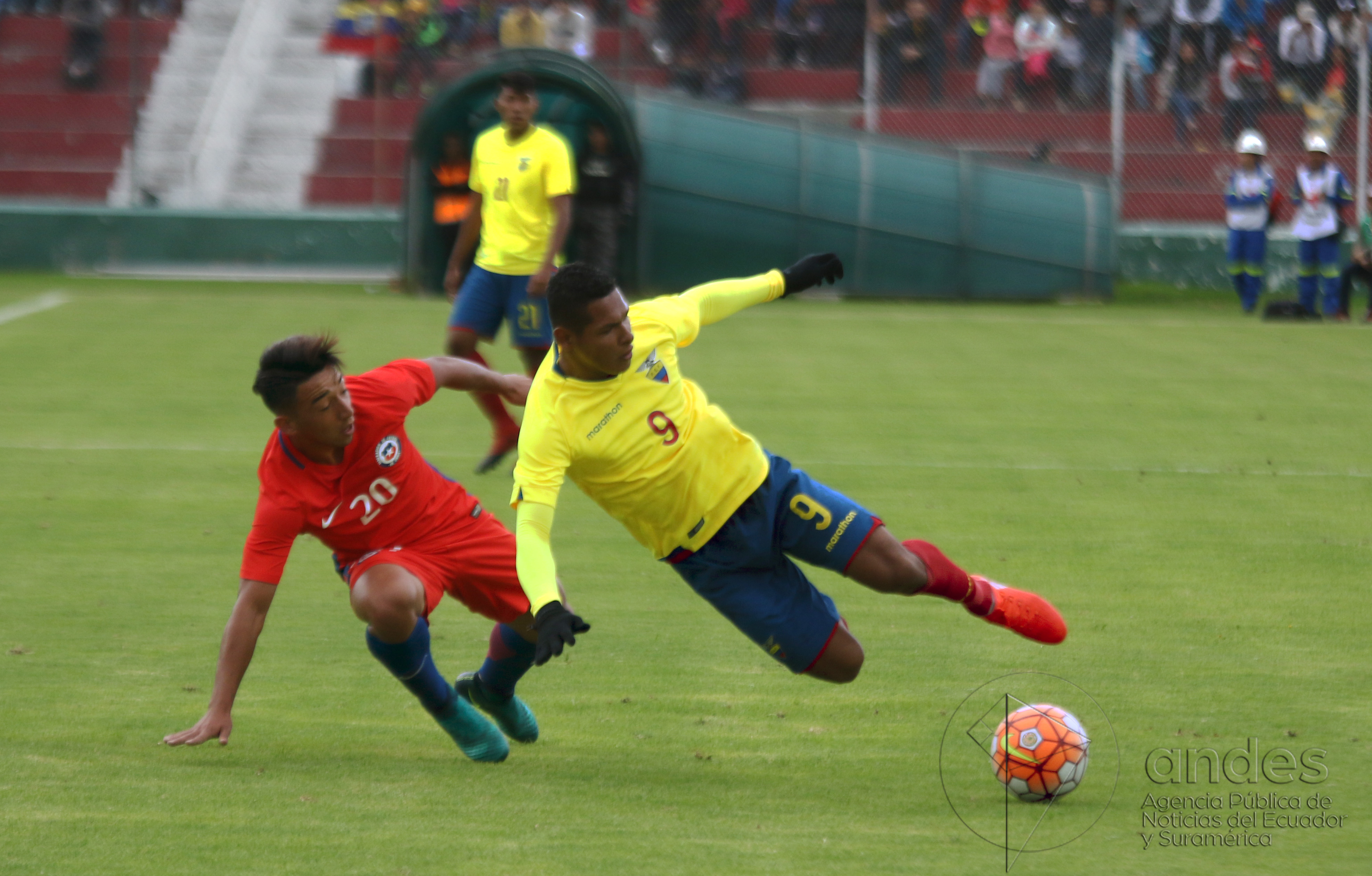 Ambato, Ecuador, 22 enero 2017 (Andes).- Ecuador igualó 1-1 este domingo con Chile en la ciudad de Ambato y dejó vivas las posibilidades de clasificar a la fase final del Campeonato Sudamericano Sub 20 del que es anfitrión, y se alista desde ya para jugar con Paraguay en la última jornada, el jueves próximo, en la ciudad ecuatoriana de Ríobamba. ANDES/Micaela Ayala V.